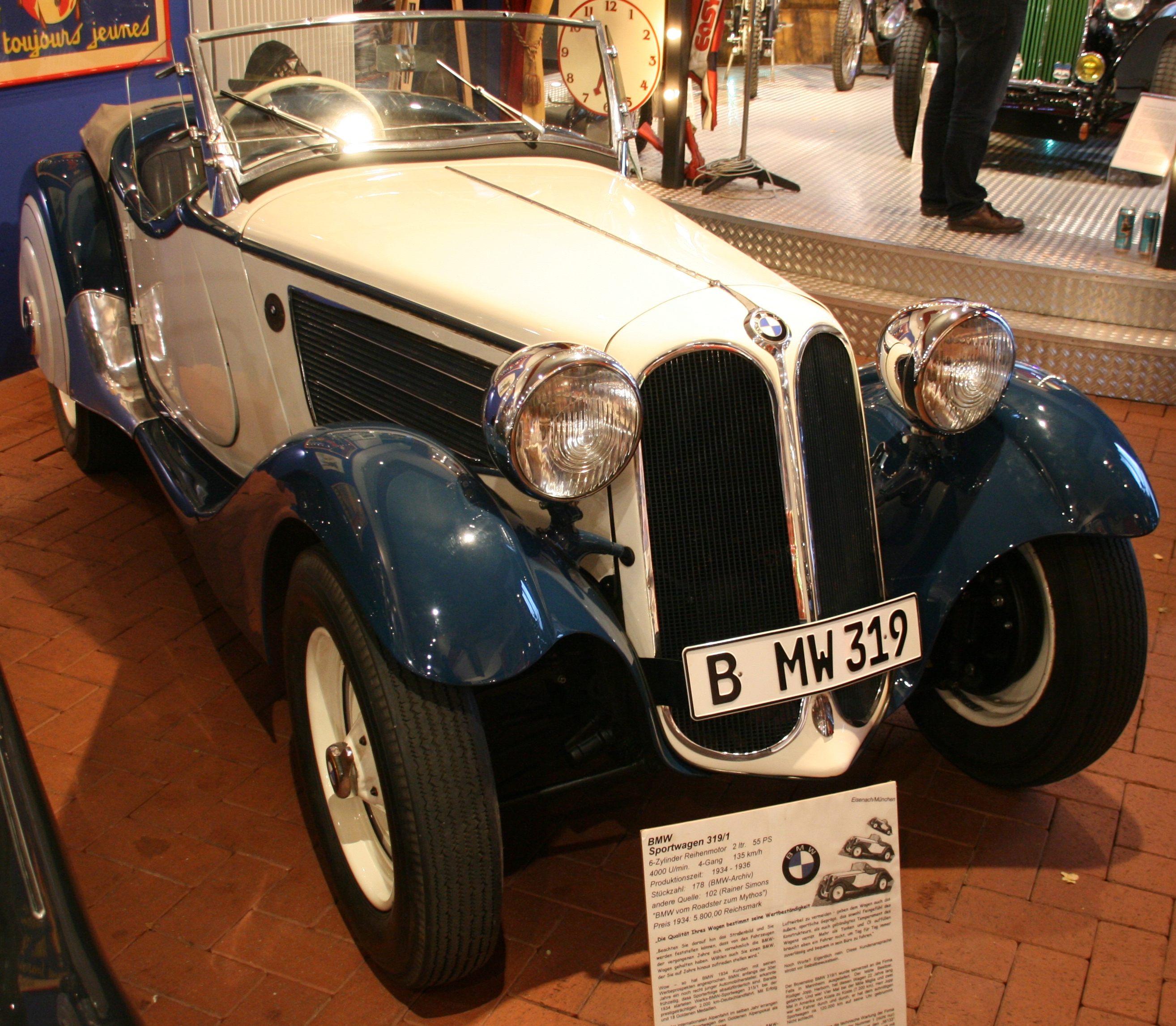 BMW 319/1 Sport im Boxenstop Tübingen